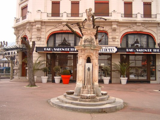 Fontaine publique dans la ville d'Aix-les-Bains en France dans le département de la Savoie près de l'hôtel palace l'Astoria.